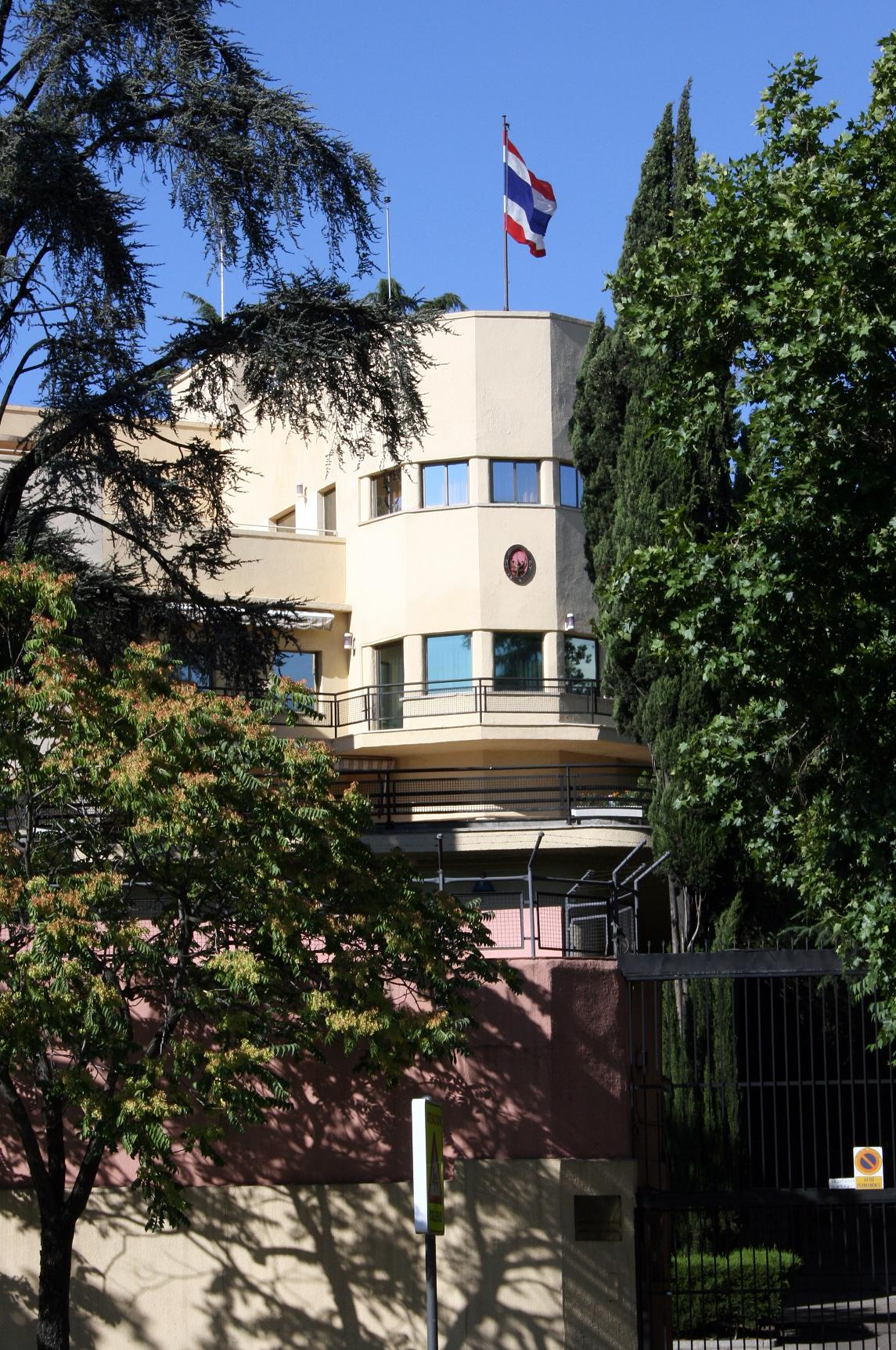 Rafael Bergamín, Casa Vega, conocida como El Barco. Proyectada como residencia particular y destinada actualmente a embajada de Tailandia, en la la calle Joaquín Costa junto a la Plaza de la República Argentina. Se trata para Miguel Fisac del edificio más representativo del racionalismo arquitectónico al nivel de la anterior casa del marqués de Villora del propio Bergamín, en la calle de Serrano, notablemente alterada en la actualidad.